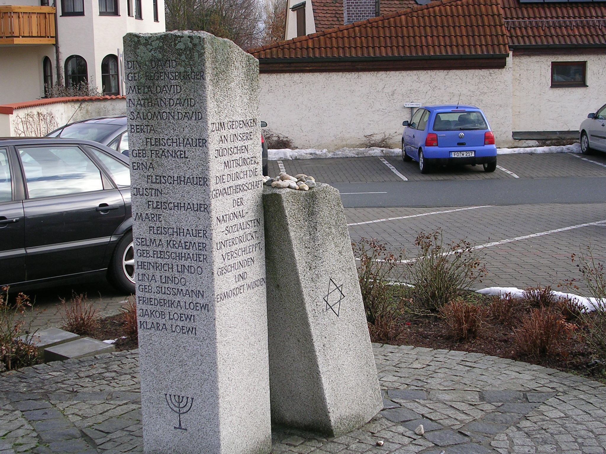 Gedenkstein an die Jüdische Gemeinde in Adelsdorf